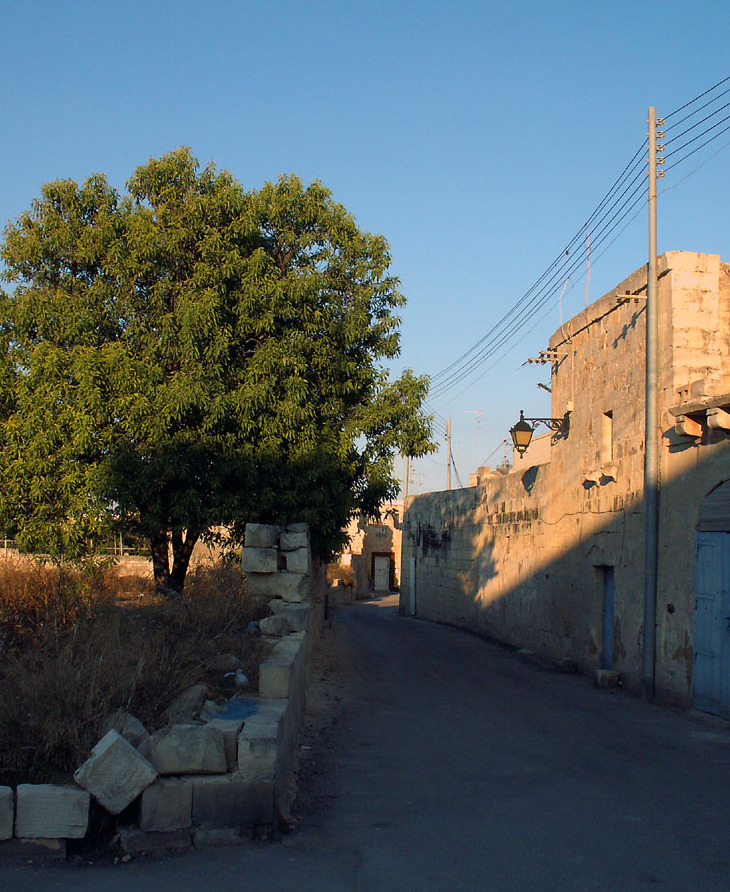 Rural Attard